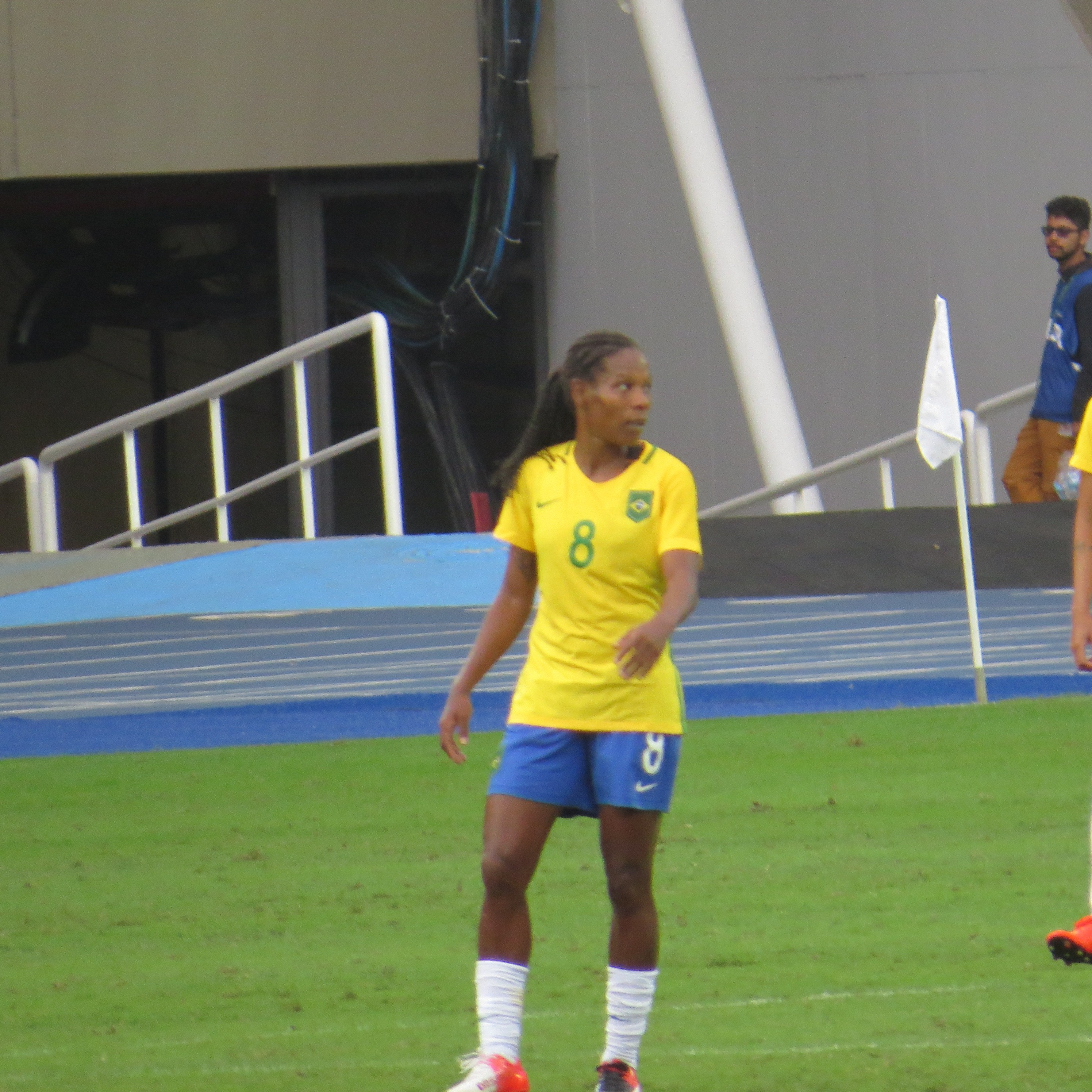 Futebol Feminino Brasil 3 x 0 China Rio 2016, Rio de Janeiro, Brasil. 03/08/16